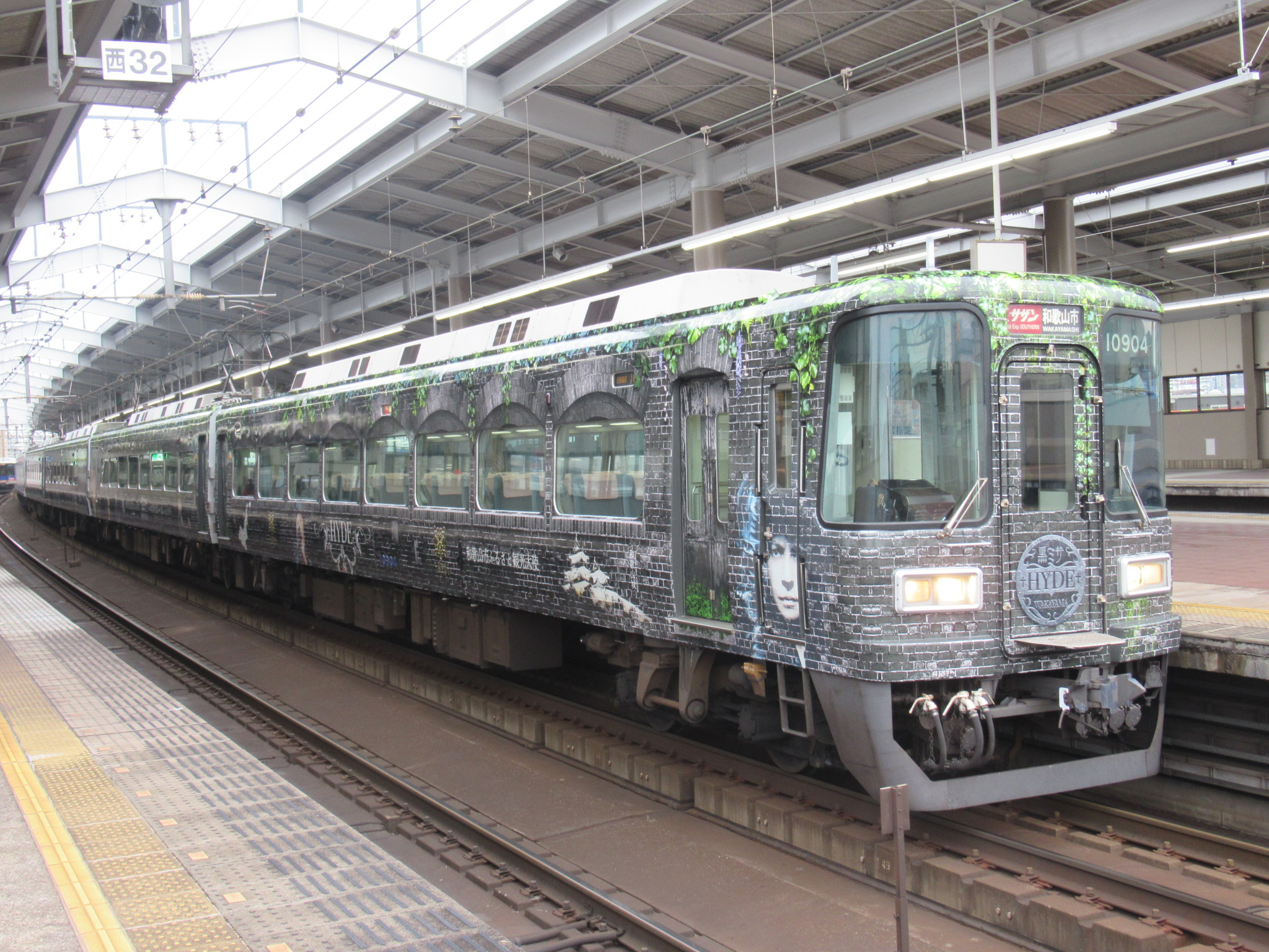 南海10904 HYDEサザン 天下茶屋駅